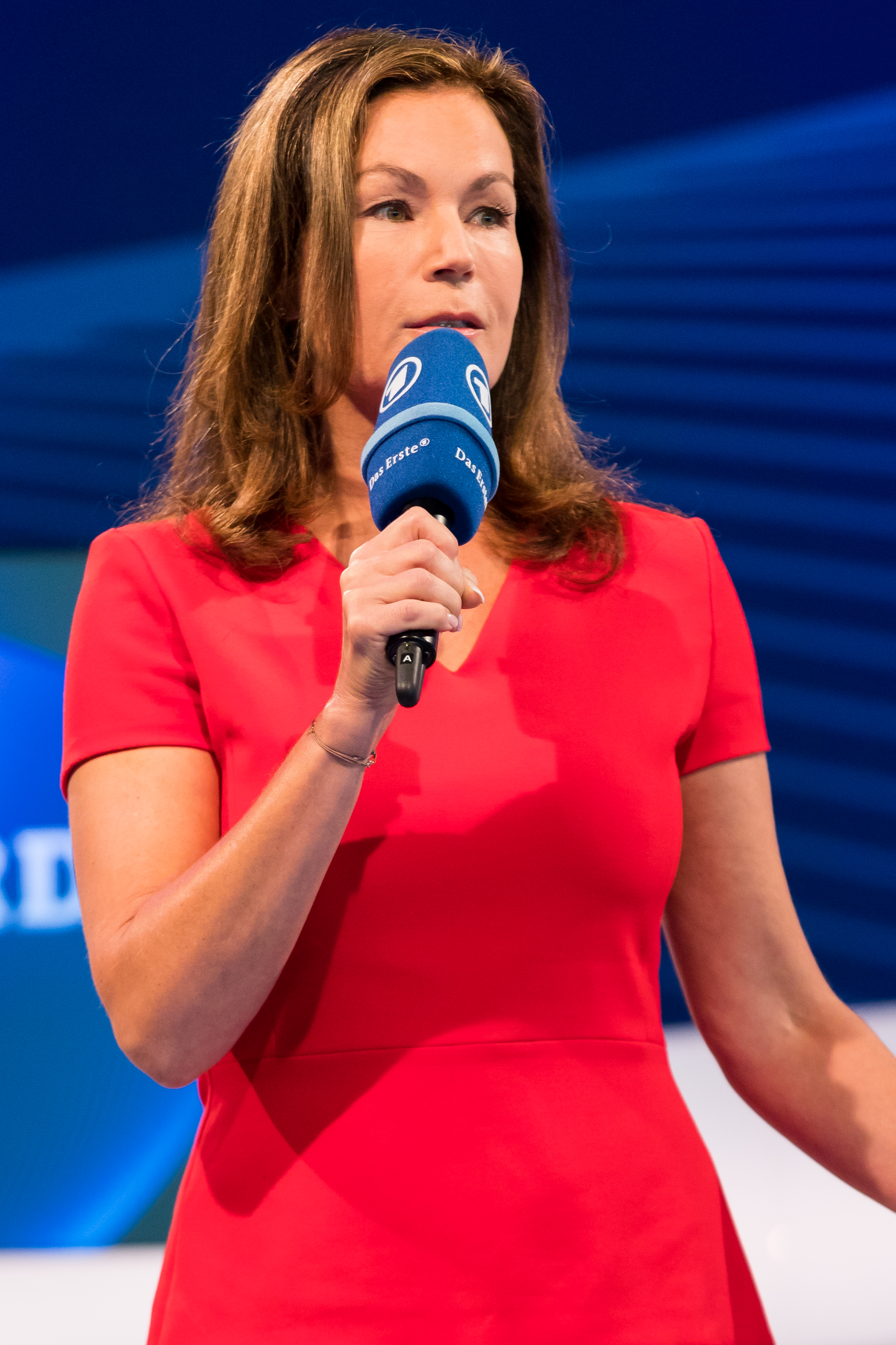 Claudia Schick during Buchmesse at Messegelände, Frankfurt, Hessen, Germany on 2017-10-14, Photo: Sven Mandel